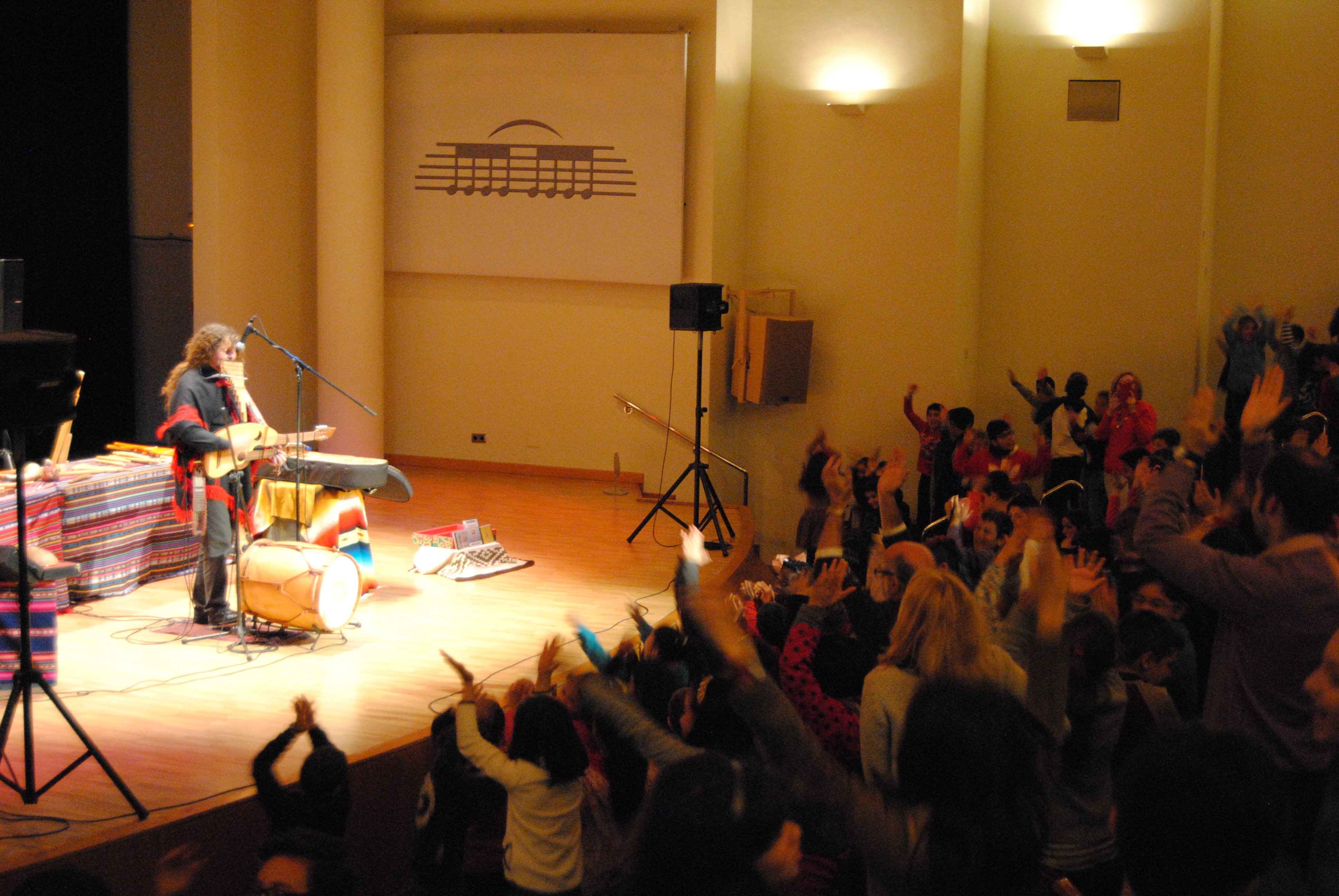 Conciertos ofrecidos para escolares de toda la Comunidad Valenciana por el músico Pablo Nahual sobre el origen de los instrumentos musicales.